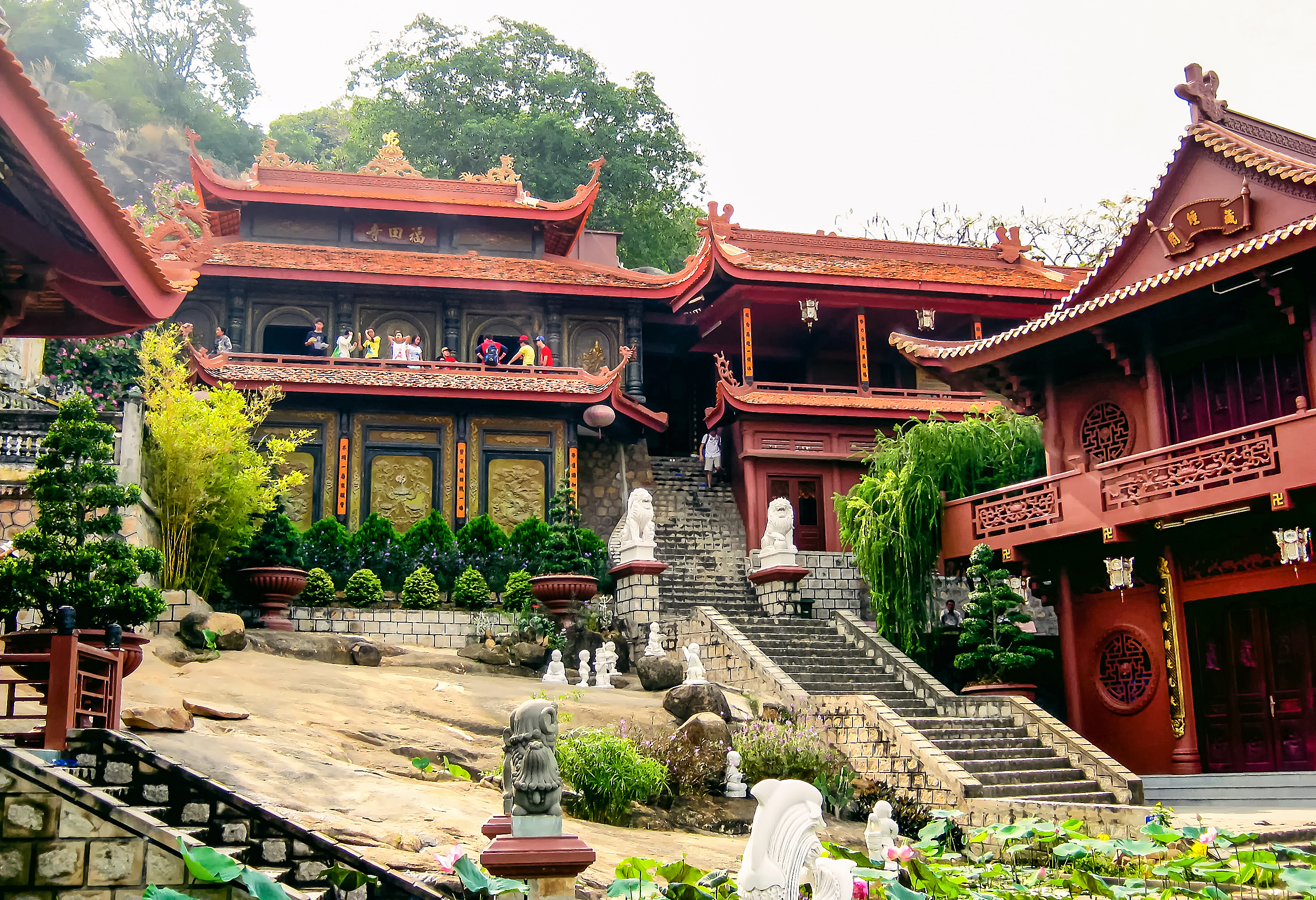 Chùa Hang (Phước Điền Tự) tọa lạc nơi triền núi Sam (Châu Đốc, An Giang, Việt Nam)